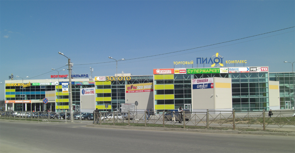 Торгово-развлекательный центр «Пилот» в Гатчине (микрорайон Аэродром)